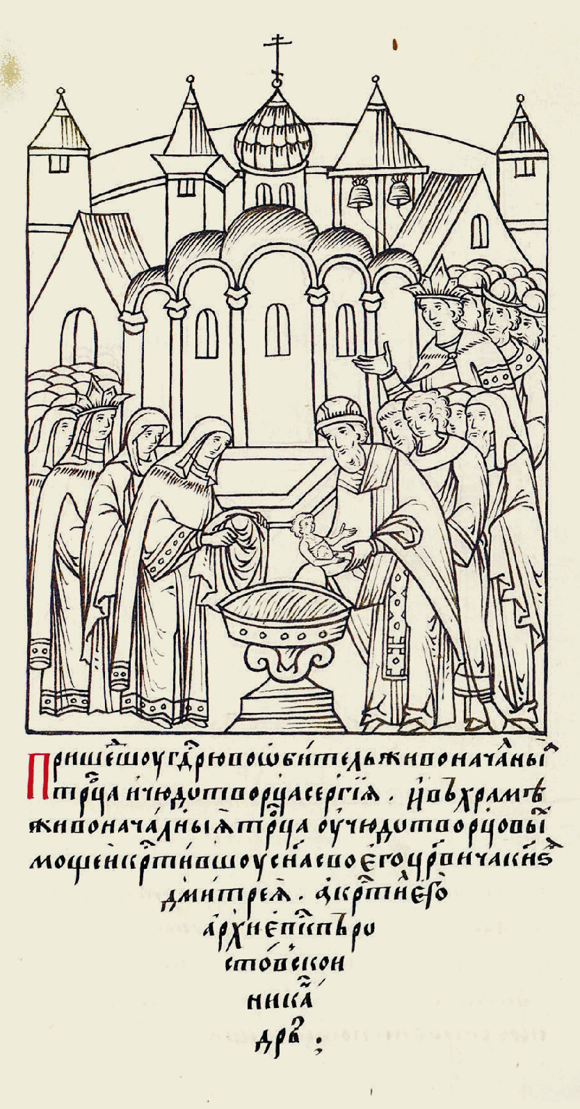 Миниатюра Лицевого летописного свода XVI в.: И пришел госу- дарь в обитель живоначальной Троицы и чудотвор- ца Сергия. И в храме живоначальной Тро- ицы у чудотворцовых мощей крестили сына своего царевича князя Дмитрия; а крестил его архиепископ Ро- стовский Никандр.